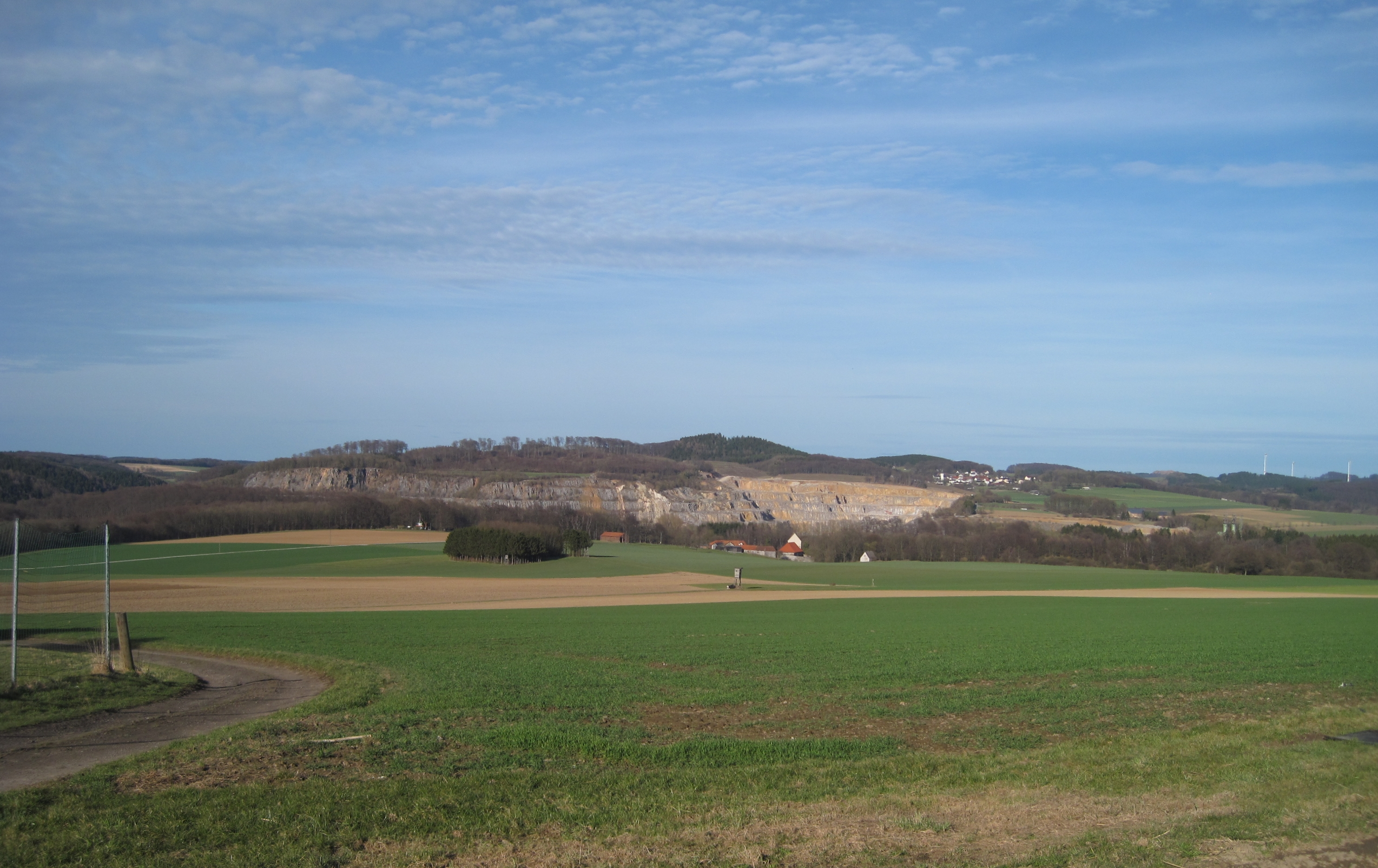 Steinbruch Rheinkalk im Hönnetal, Balve. Blickrichtung aus Hemer-Brockhausen, östlich Neuer Weg 8/Kissenweg ,Richtung B 515.